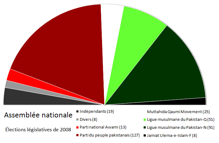 Composition de l'Assemblée nationale du Pakistan en janvier 2011, après les élections de 2008 et les élections partielles tenues depuis